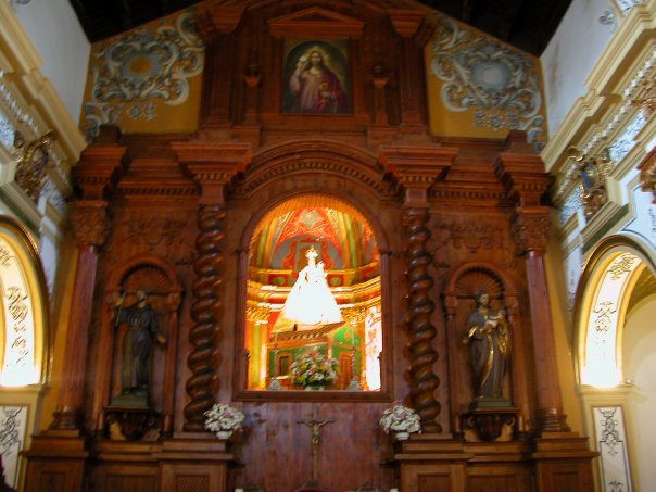 Altar Mayor de la Iglesia Parroquial de Nuestra Señora de Loreto, Algezares (Murcia) Spain